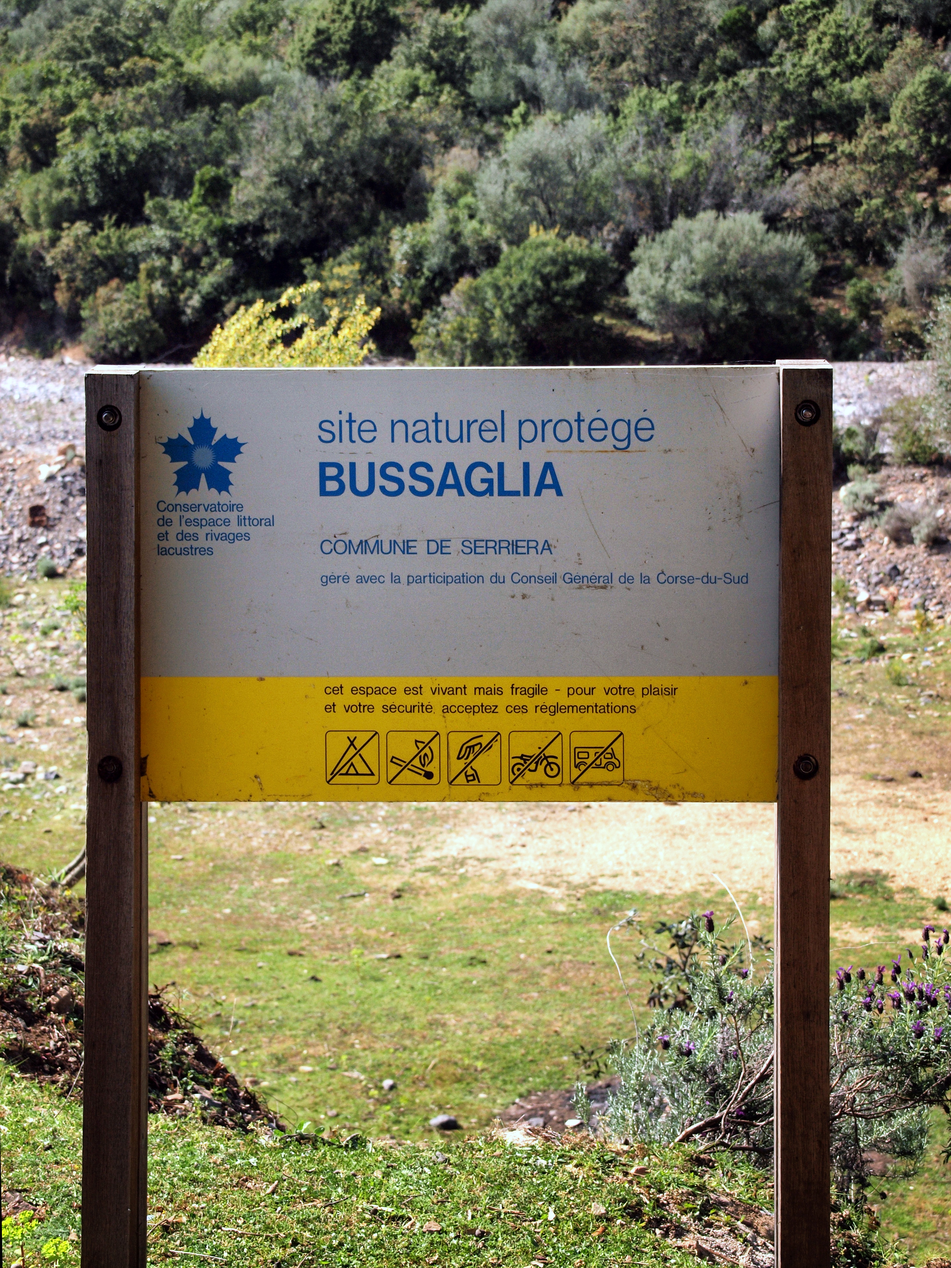 Serriera, Ouest Corse - Panneau site du Conservatoire du Littoral de Bussaghia